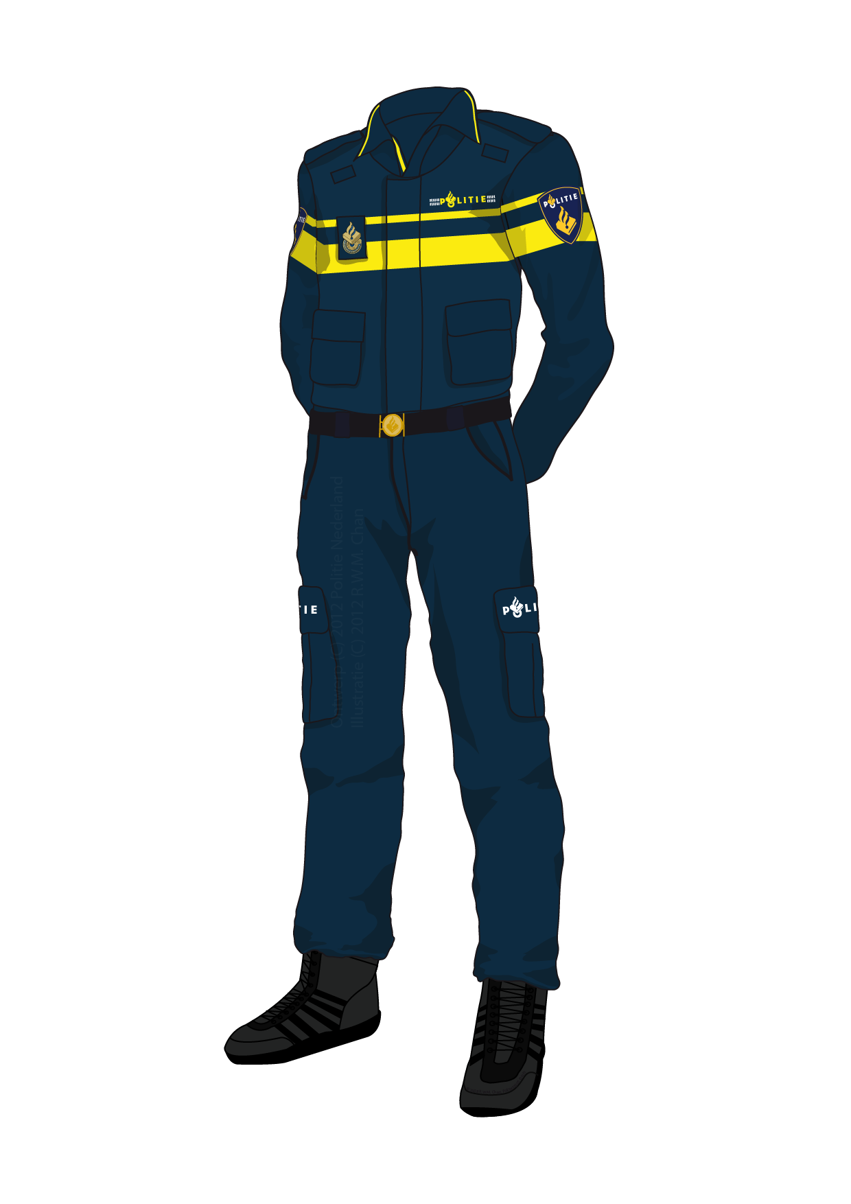 Uniform van de Nederlandse politie per 2014. Kleuren gebaseerd op schetsen van de vtsPN. Kleuren kunnen dus nog wijzigen op het definitieve product.